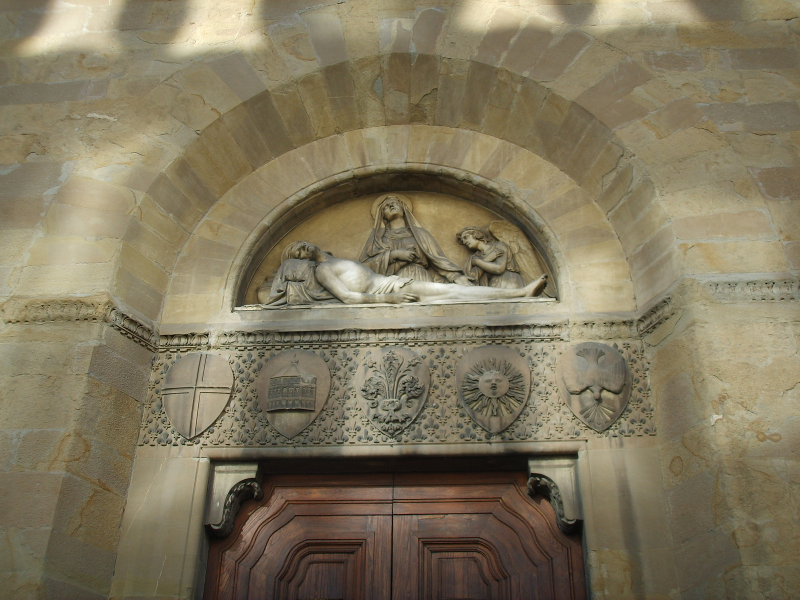 San Giuseppe (Via Santa Caterina d'Alessandria) portale